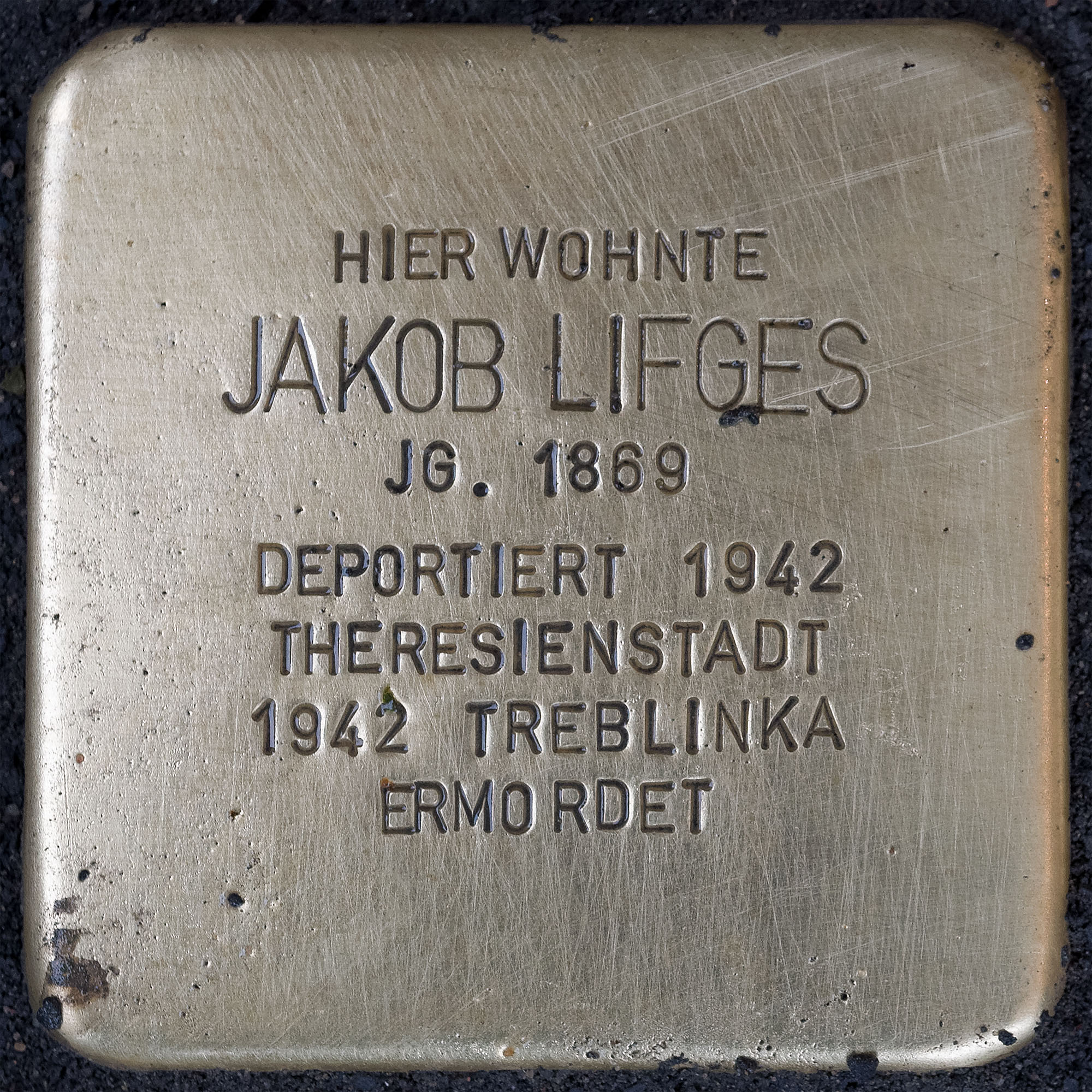 Stolpersteine Suechteln: Lifges, Jakob